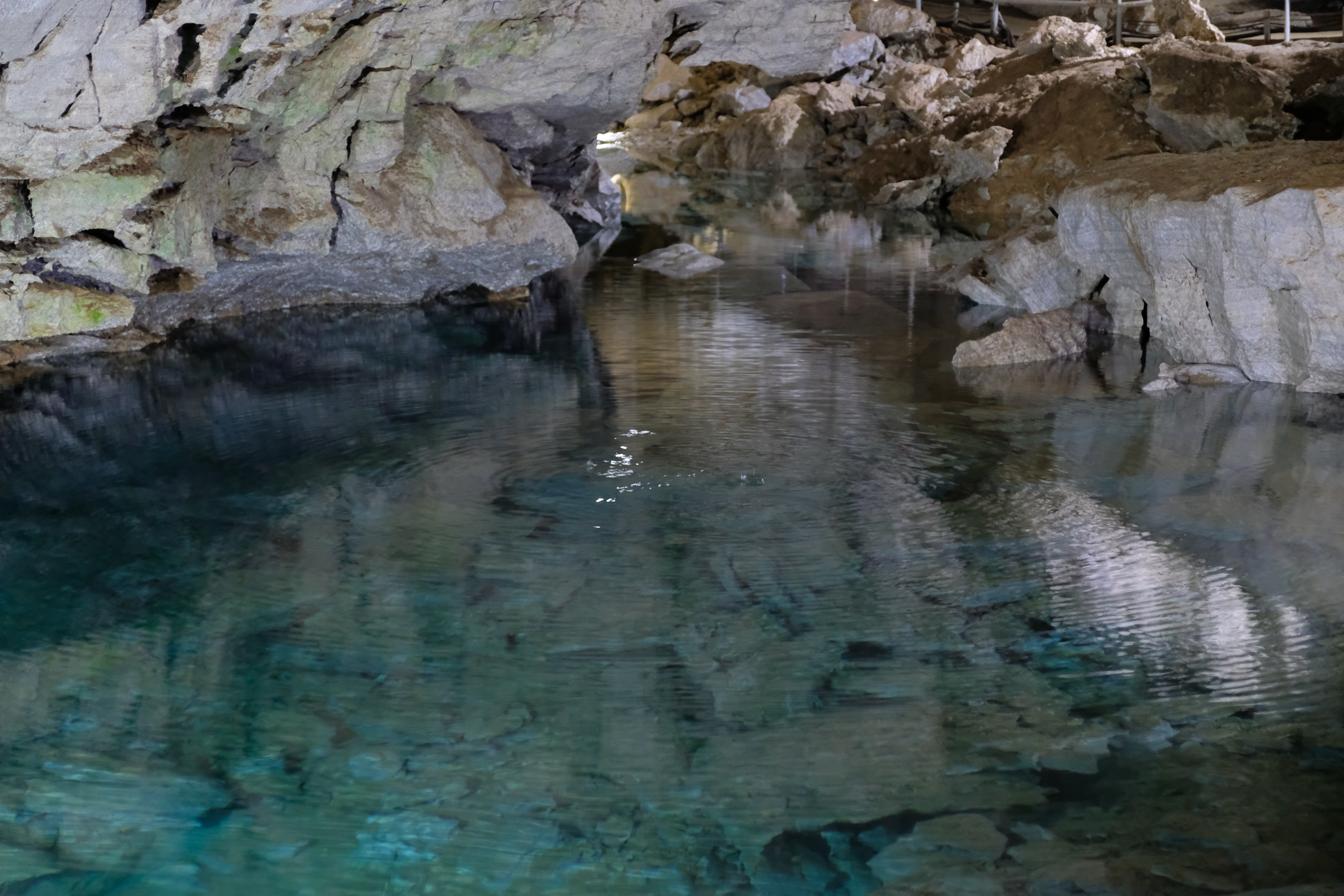 Кунгурская пещера. Грот Длинный.